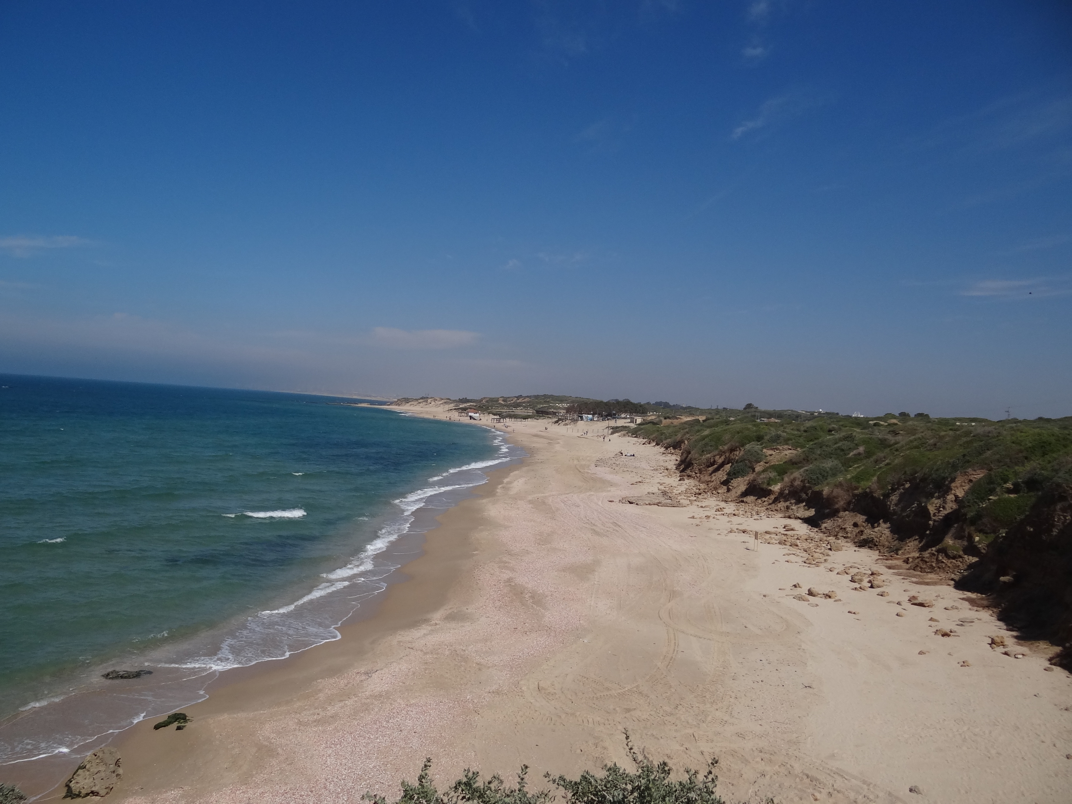 Yavne-Yam is an archaeological site located on Israel's southern Mediterranean coast יבנה-ים הייתה עיר נמל עתיקה בארץ ישראל. יישוב משגשג, אחת מערי הנמל החשובות שמדרום ליפו. האתר ארכאולוגי שוכן על גבי תל בגן הלאומי חוף פלמחים. חוף פלמחים כפי שנשקף מתל יבנה ים